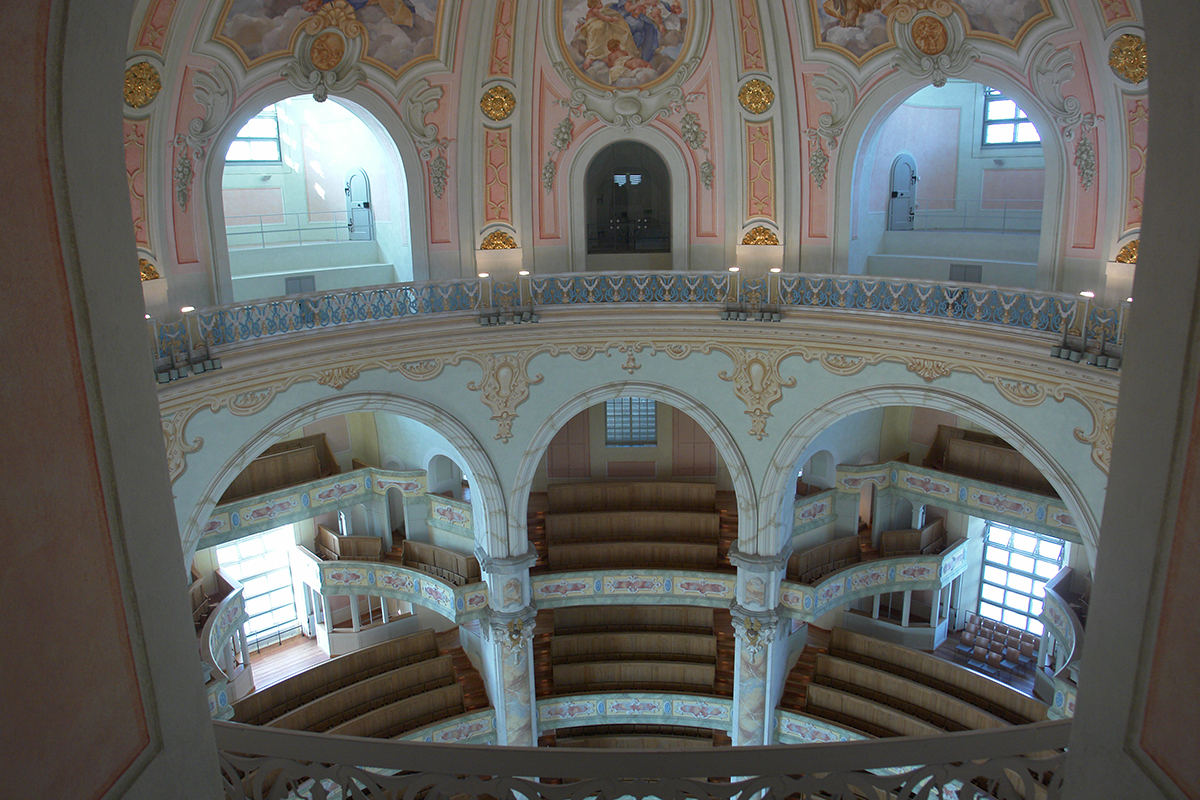 Dresdener Frauenkirche, Innenansicht